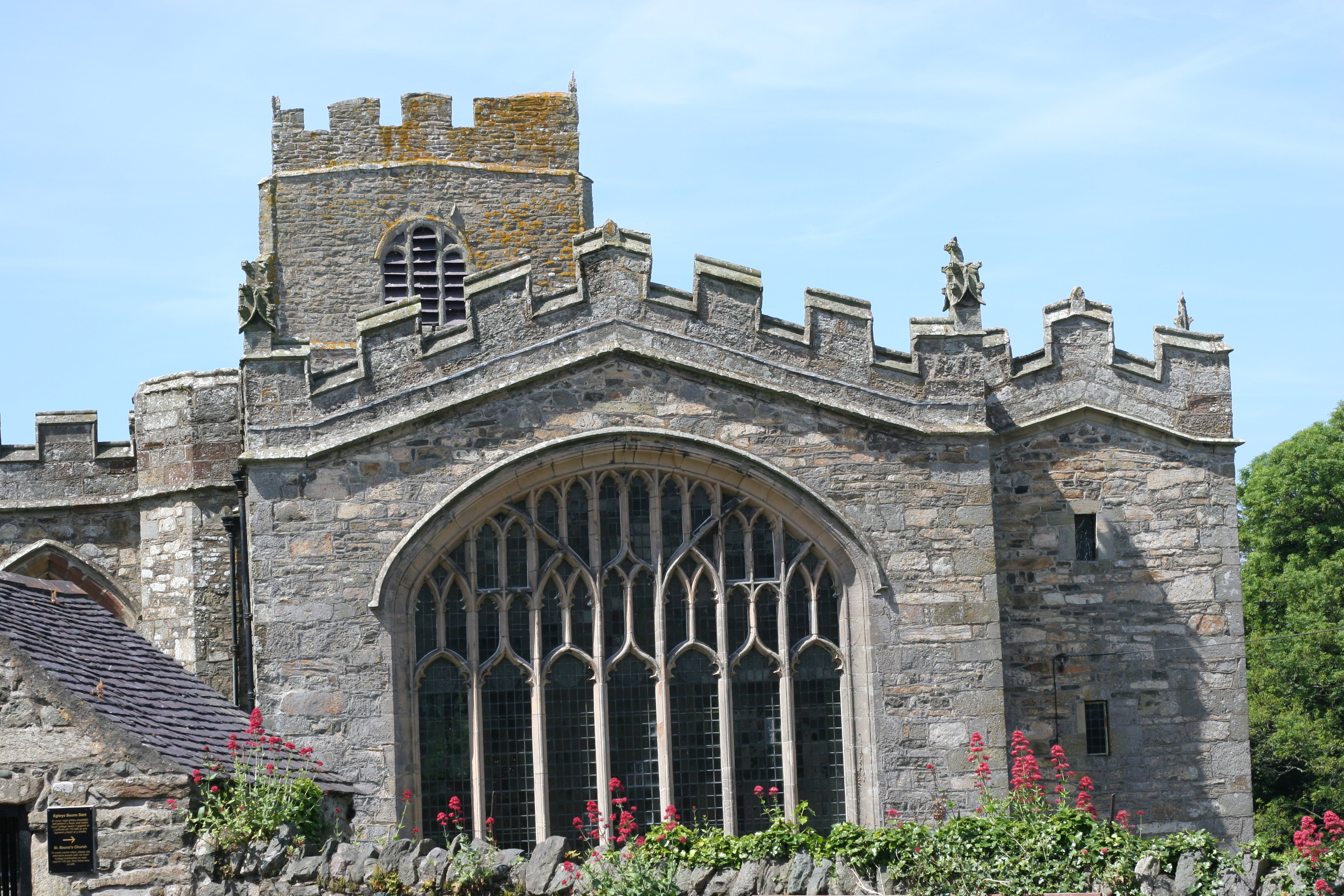 Eglwys Clynnog Fawr / Clynnog Fawr church 09/06/2006 Rhion Protchard : own work